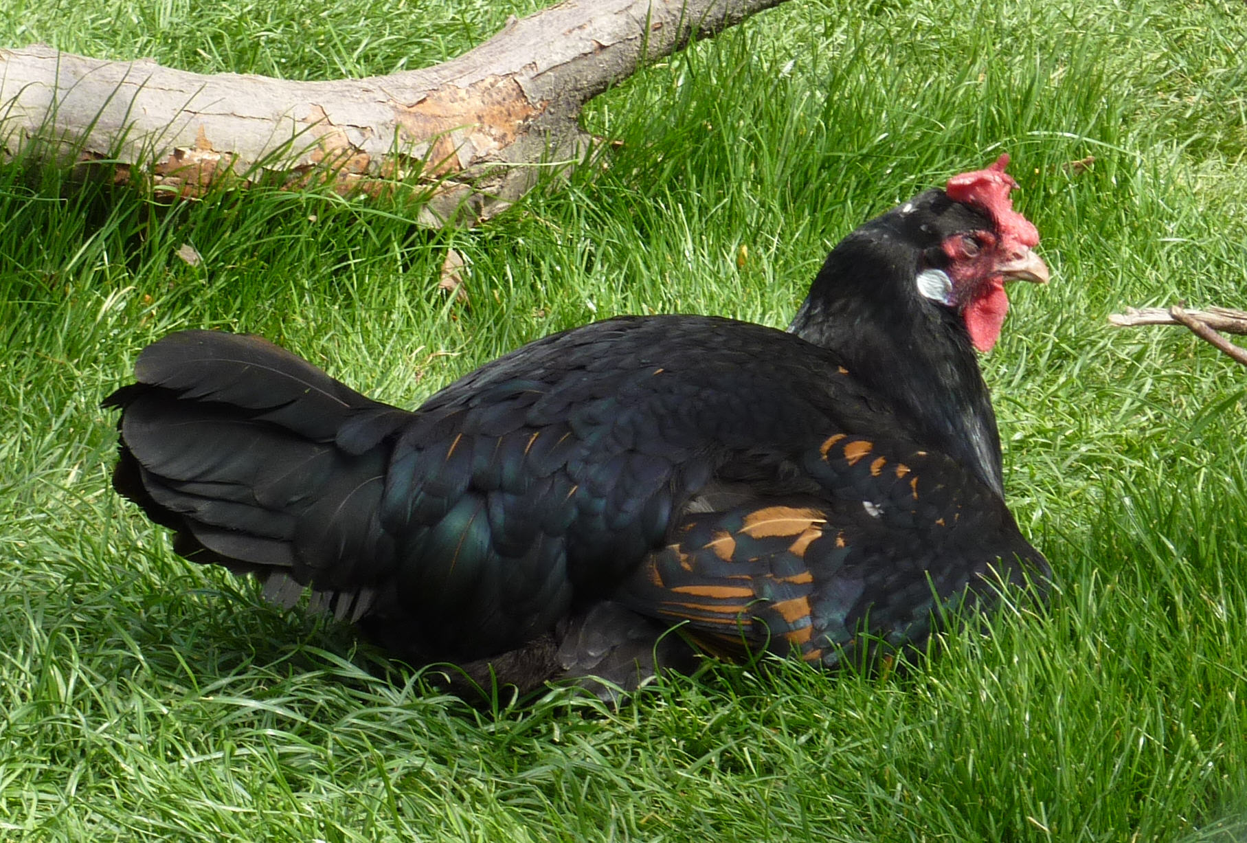 im Schaubauernhof der Wilhelma